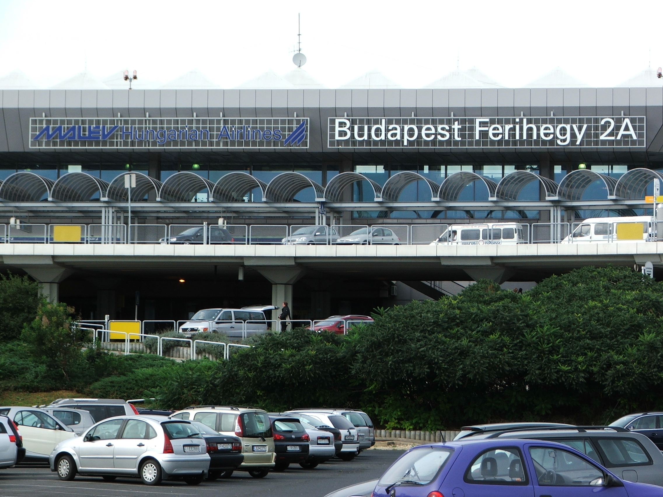 Budapest Ferihegy 2A Photo: József Süveg (2005)